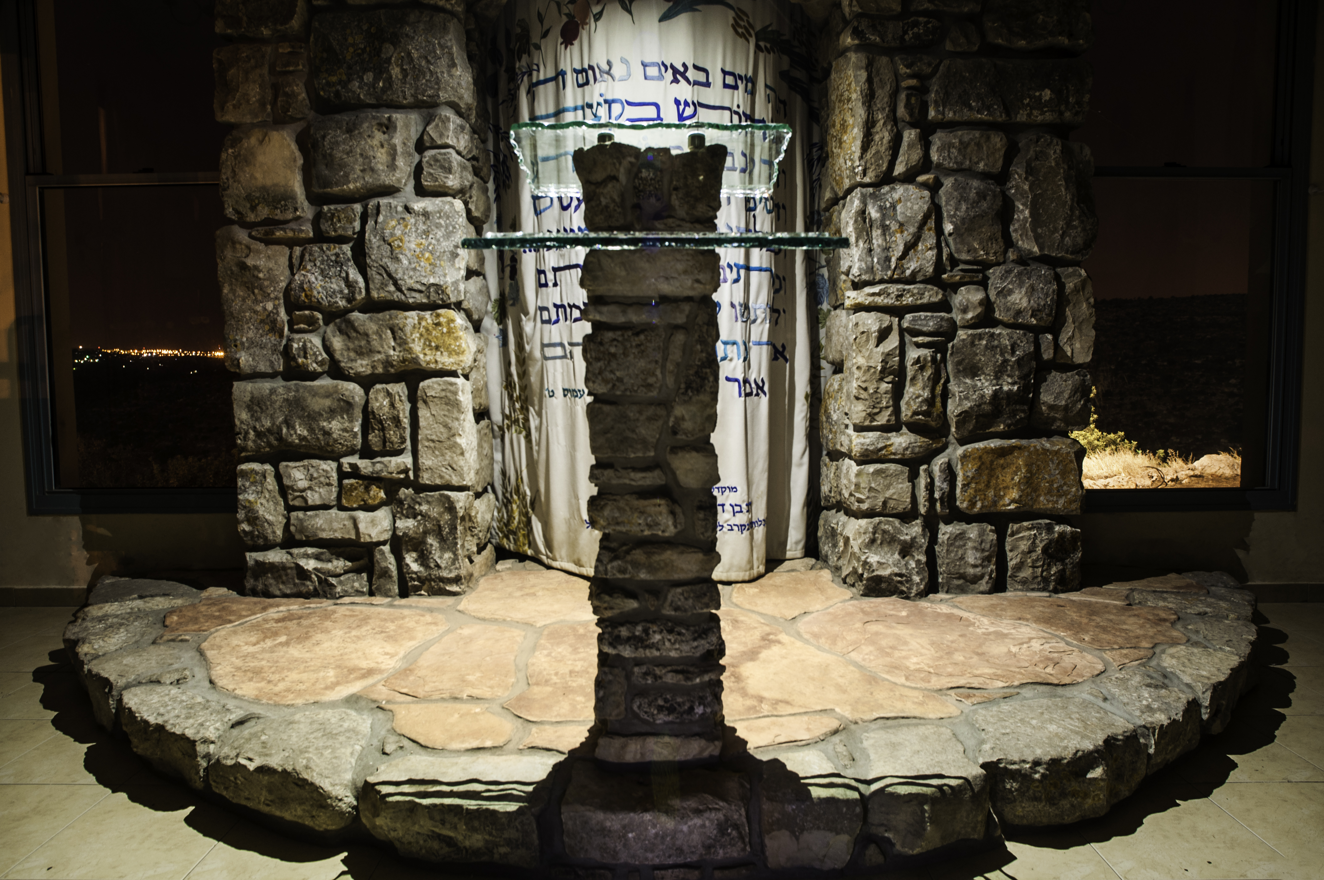 עמוד תפילה מאבן וזכוכית, יצירת האמן אסף קדרון